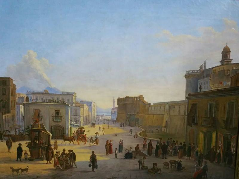 Napoli, Largo di Castello. Luogo di esposizione sconosciuto.